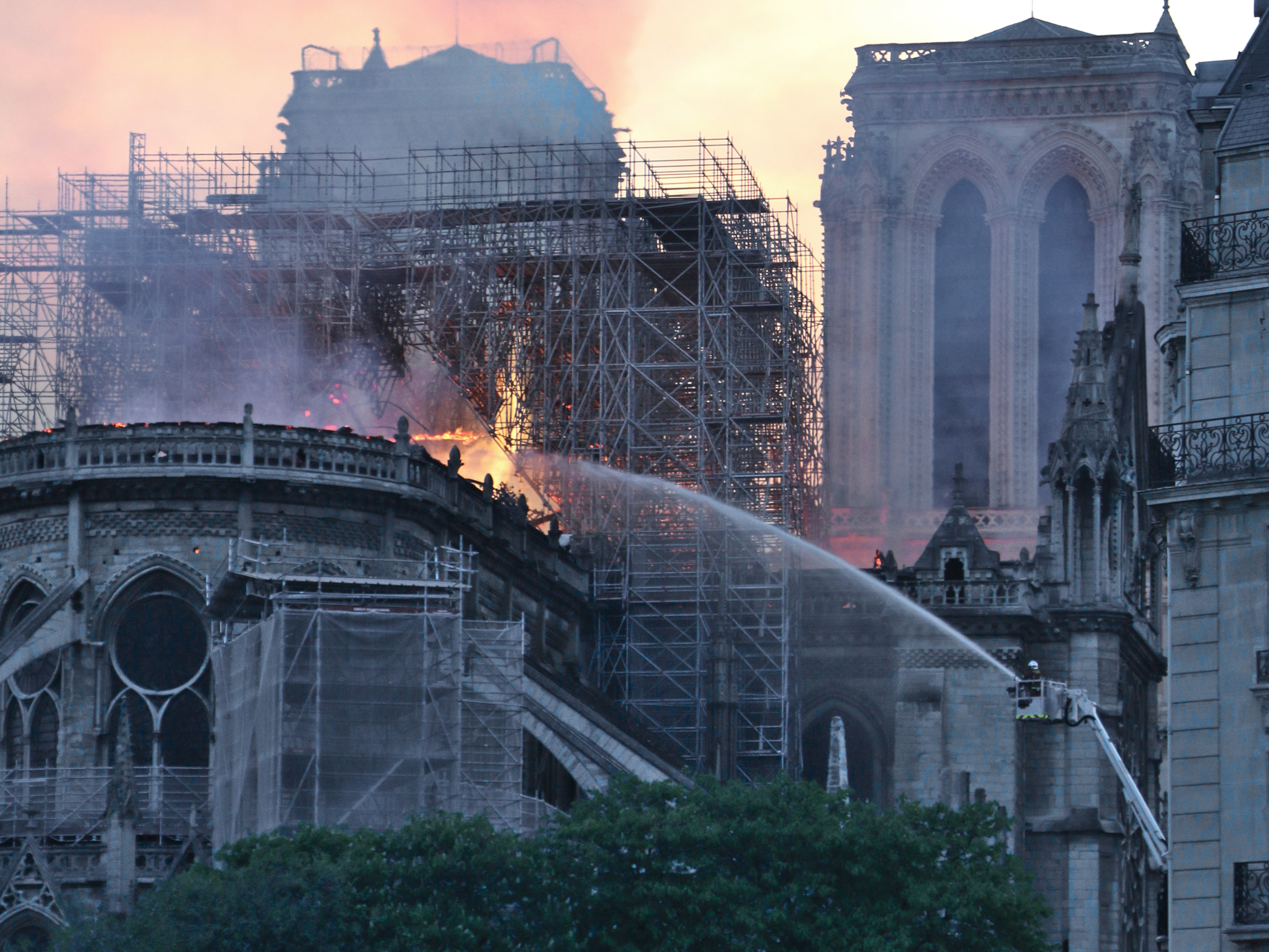 Incendie de la cathédrale notre dame de Paris (avril 2019) vu de l'île saint-Louis